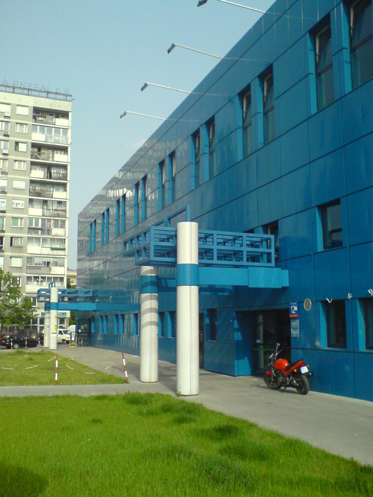 PL, Warszawa, D.S. Riviera, klub "Remont", ul. Waryńskiego 12 (ściana północna, wejście w głębi)